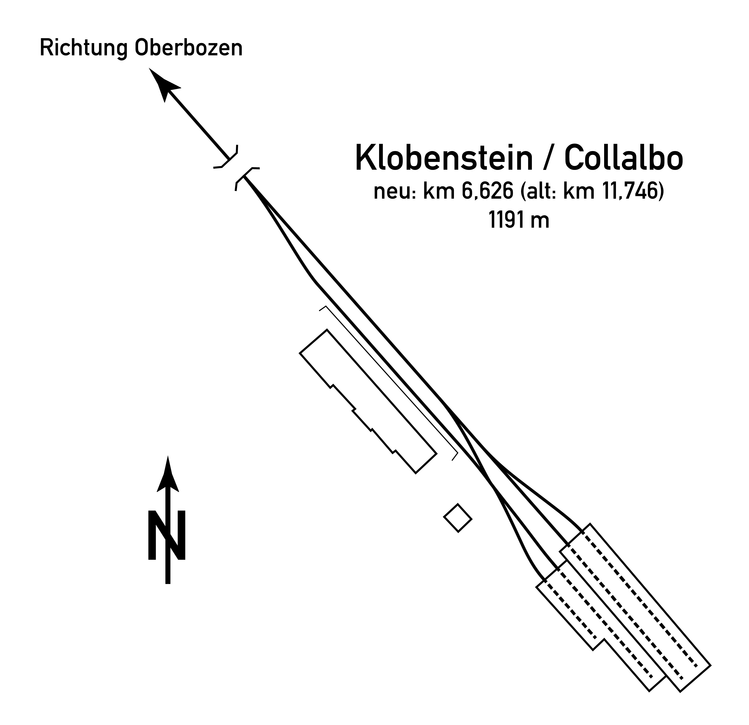 Gleisplan des Bahnhof Klobenstein / Collabo der Rittner Bahn